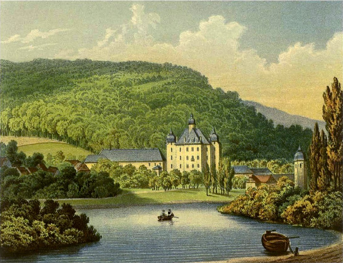 Schloss Allner, Sieg-Kreis, Rheinprovinz